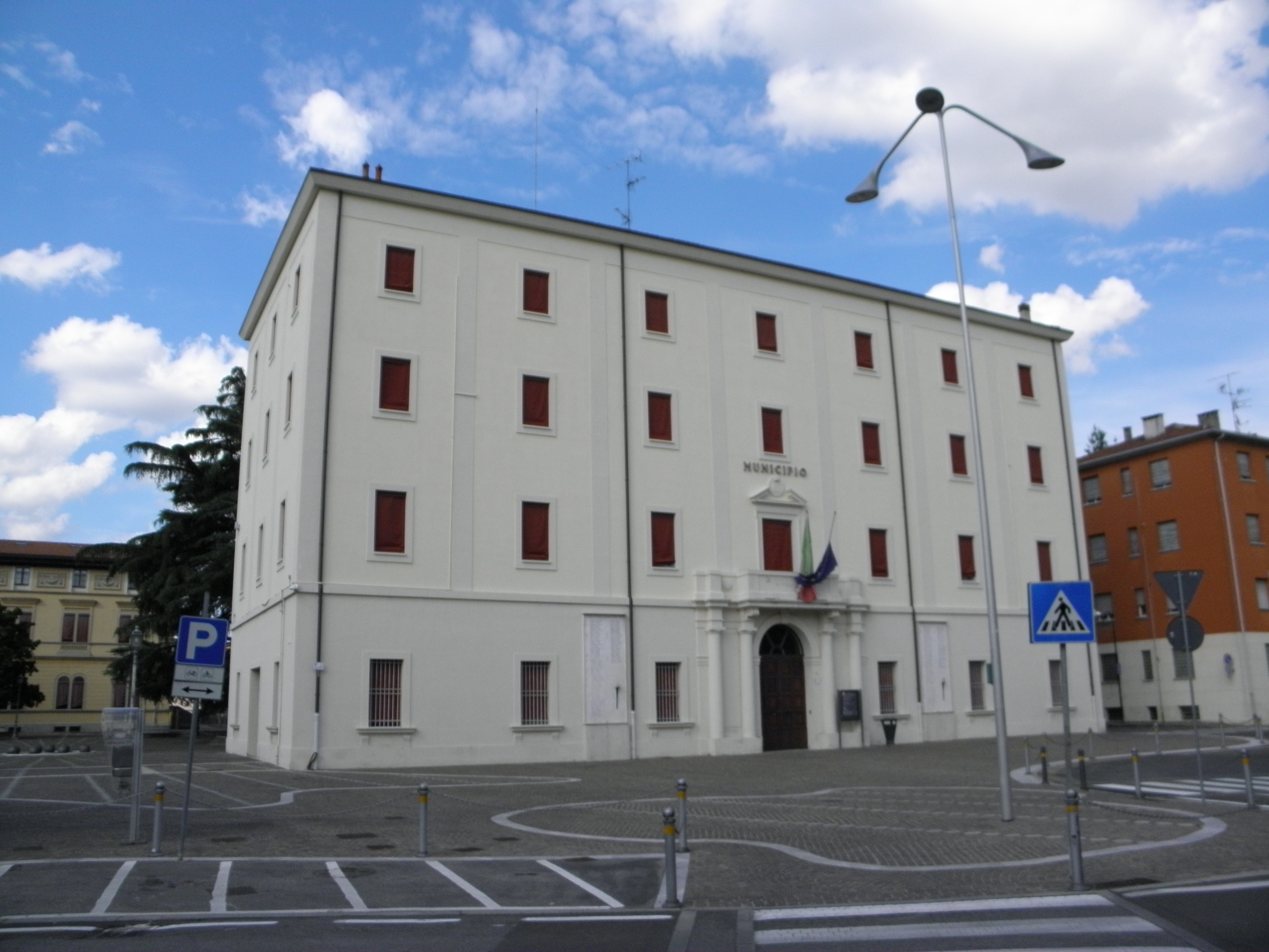 castel Maggiore, il Palazzo comunale.